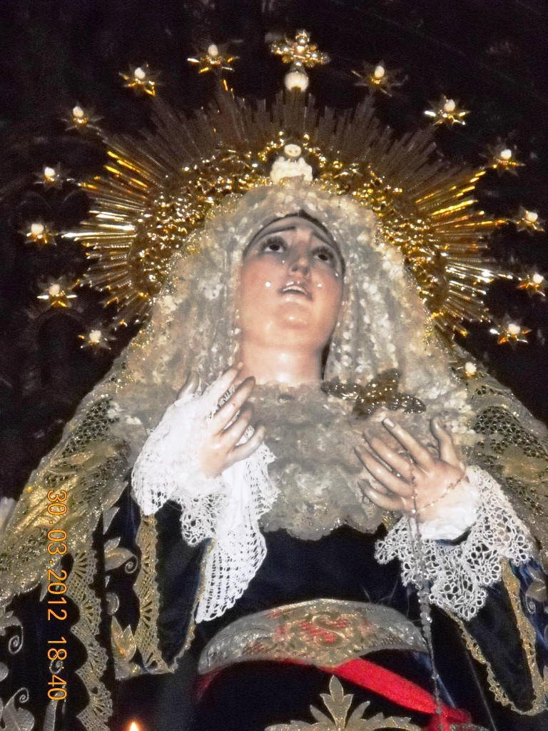 Virgen de la Soledad